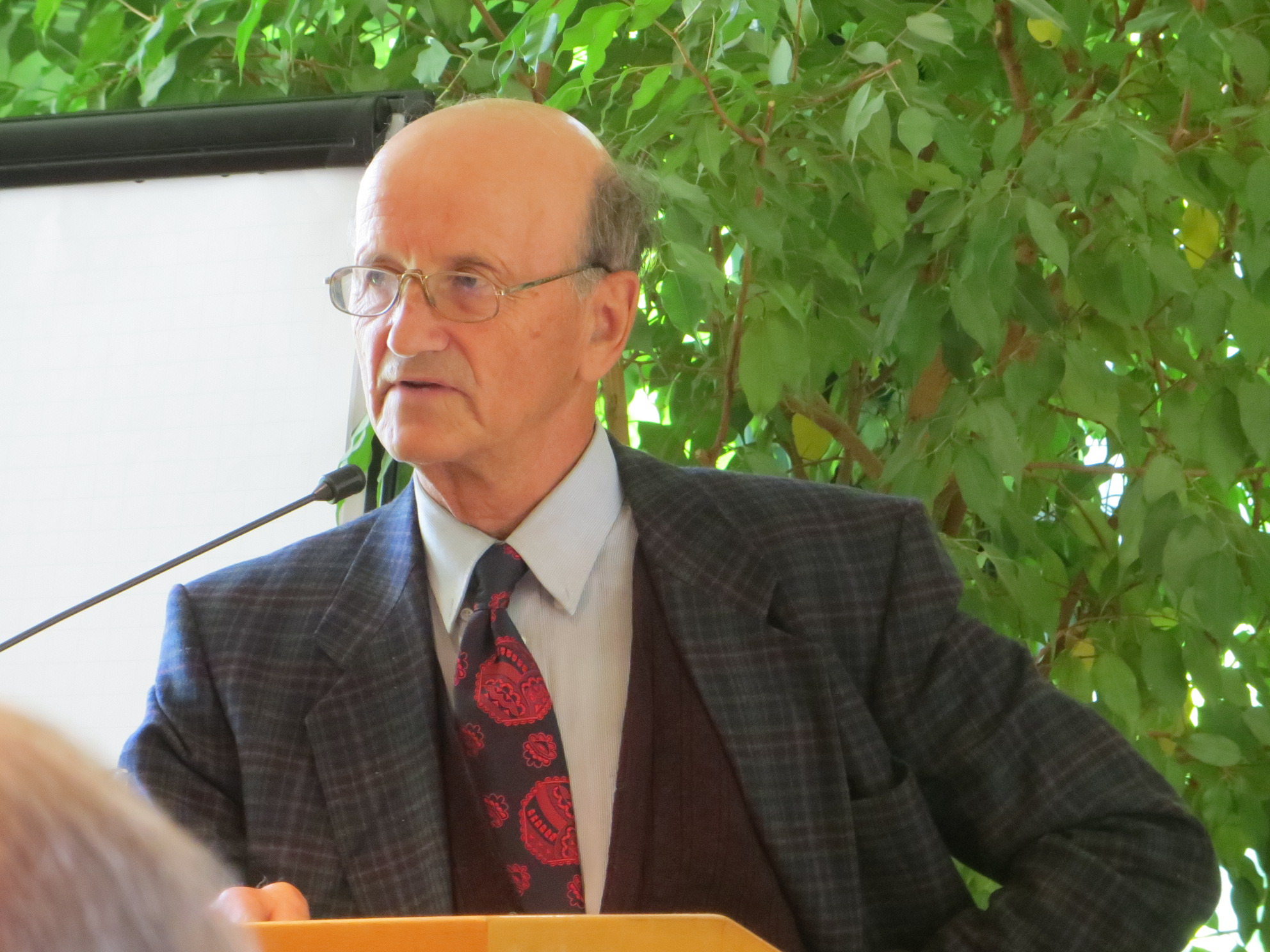 Prof. Dr. Anton Grabner-Haider